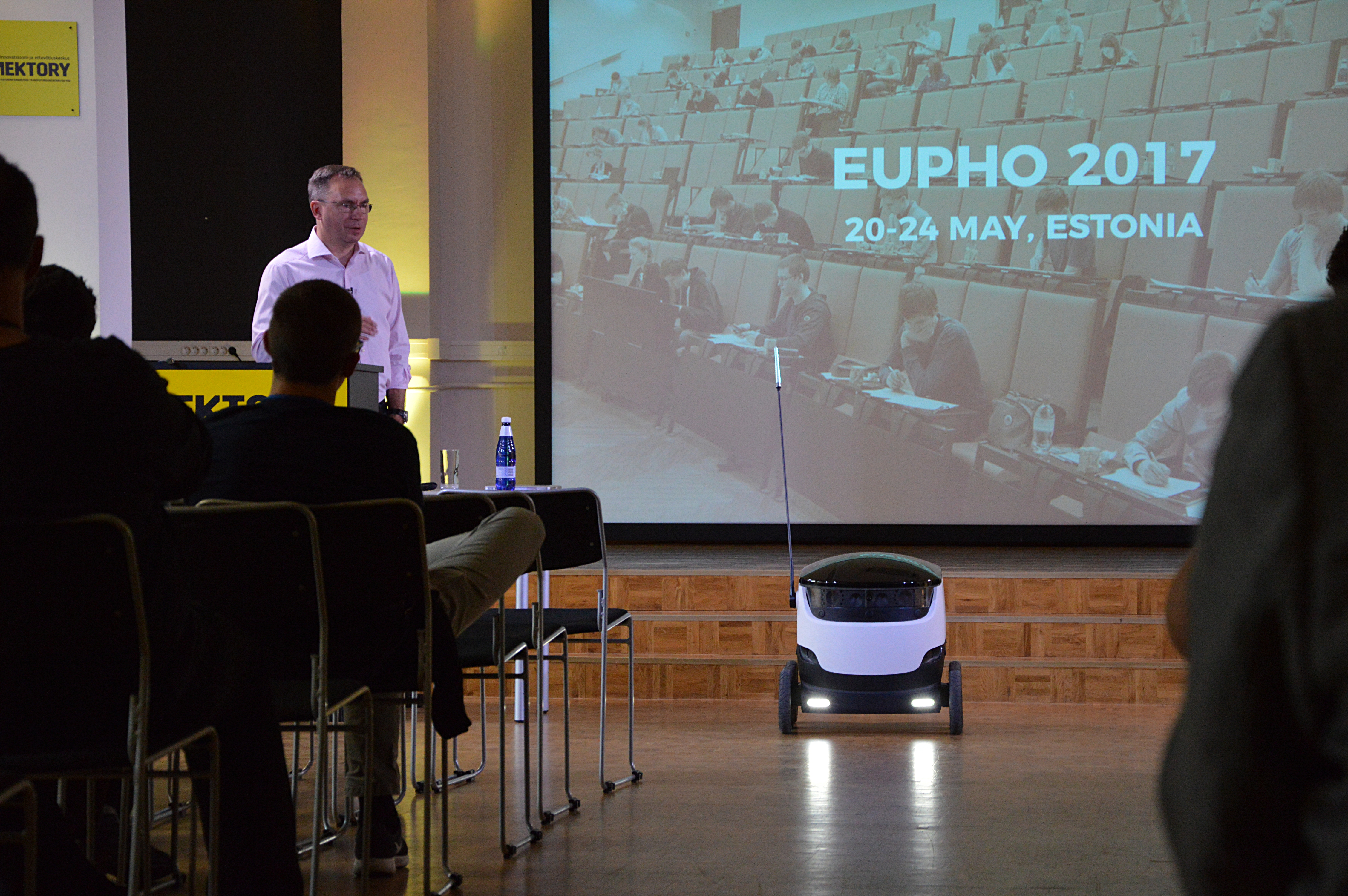 Allan Martinson